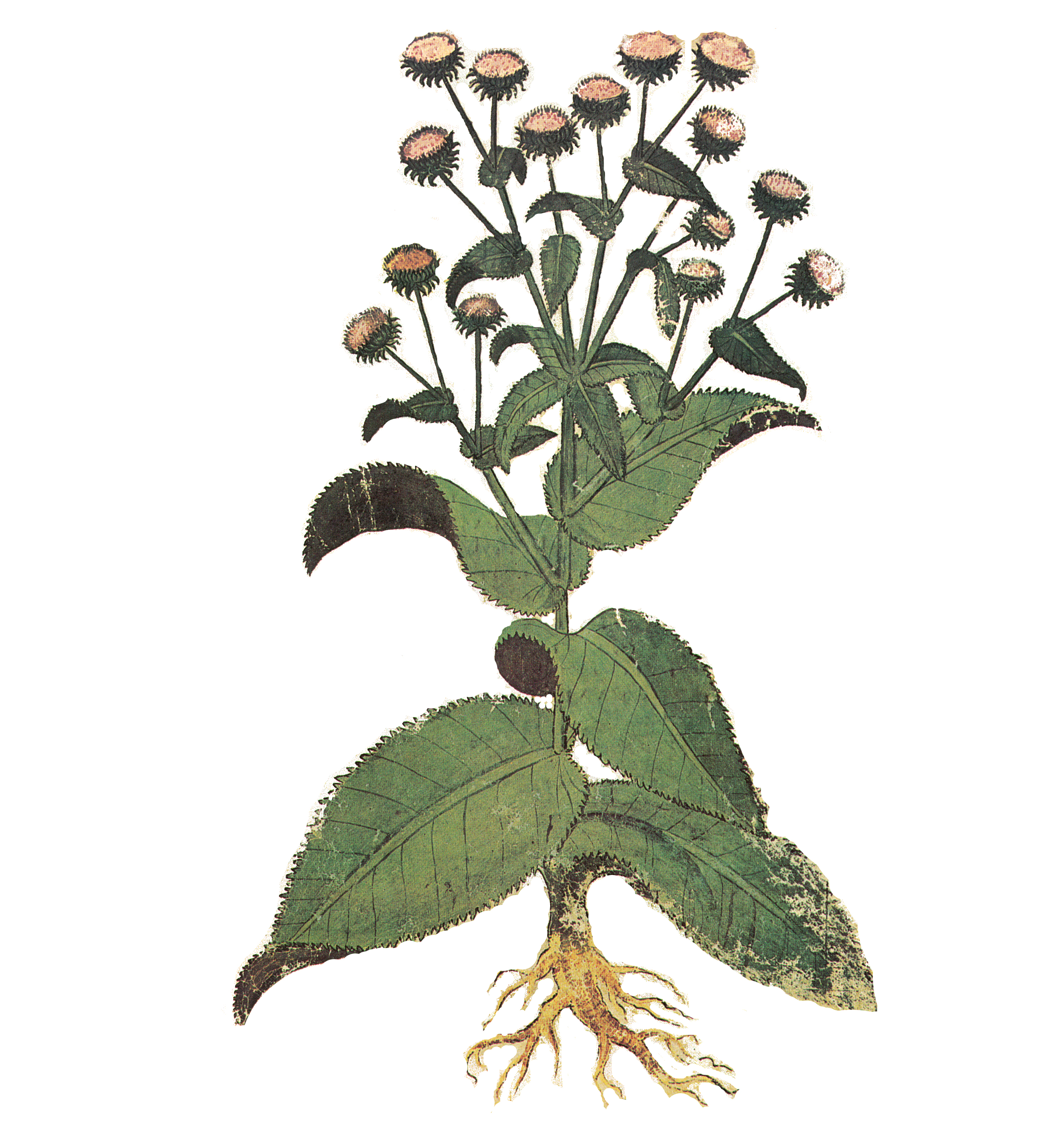 Echter Alant (Inula helenium). Pflanzenbild im Wiener Dioskurides